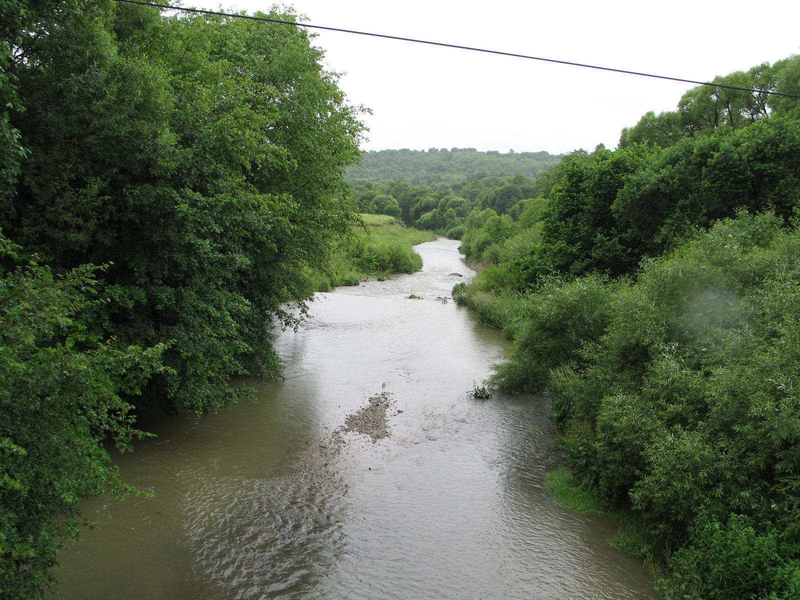 Rozvodnená Ladomirka pred obcou Ladomirova na začiatku letného slnovratu (most do obce Krajné Čierno)